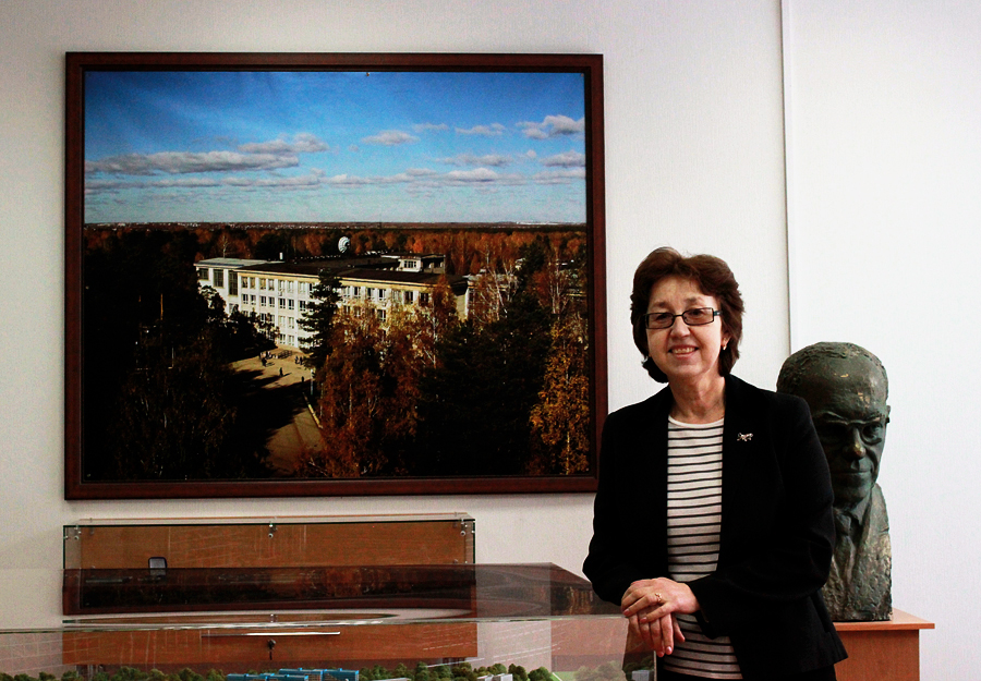 Заведующая музеем истории НГУ, кандидат исторических наук, доцент кафедры истории России Лидия Николаевна Воробцова